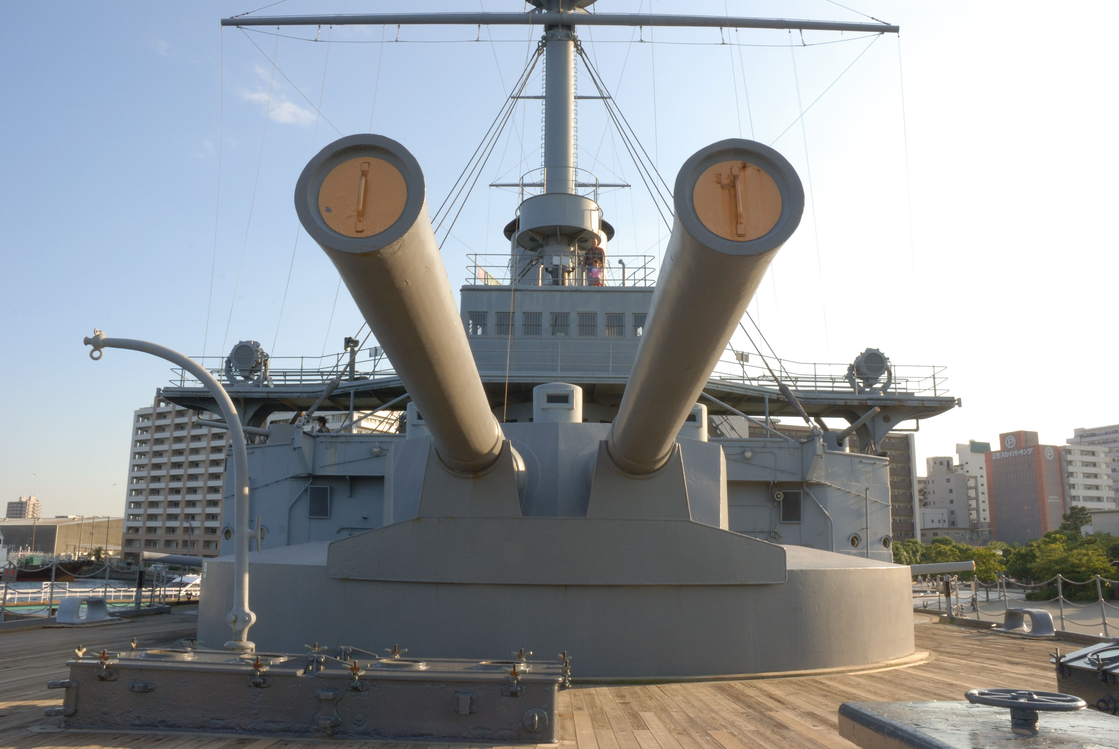 Mikasa zenbu shuho